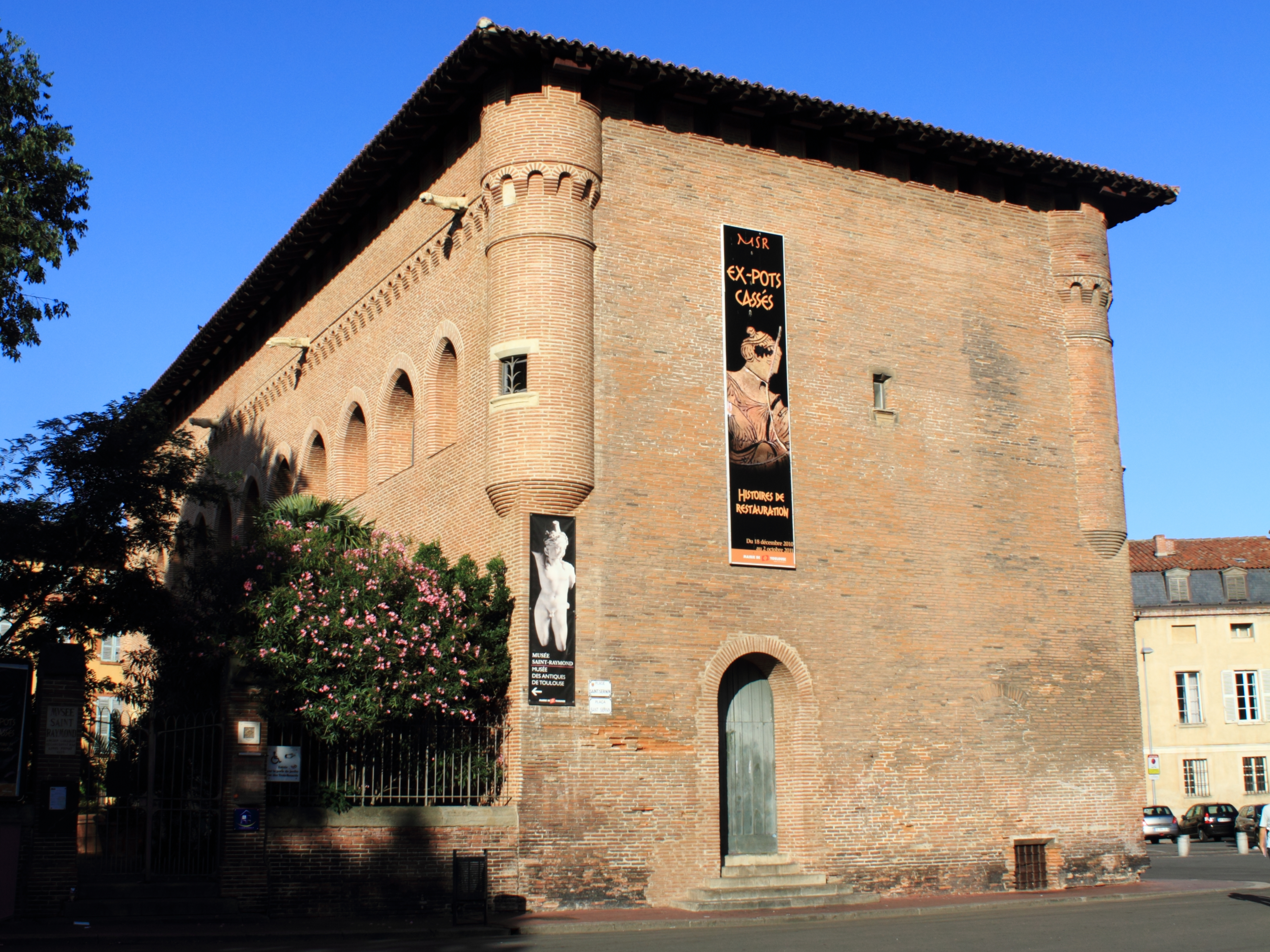 Toulouse (Haute-Garonne, France) : Le Musée Saint-Raymond vu depuis la rue des Trois Renards.